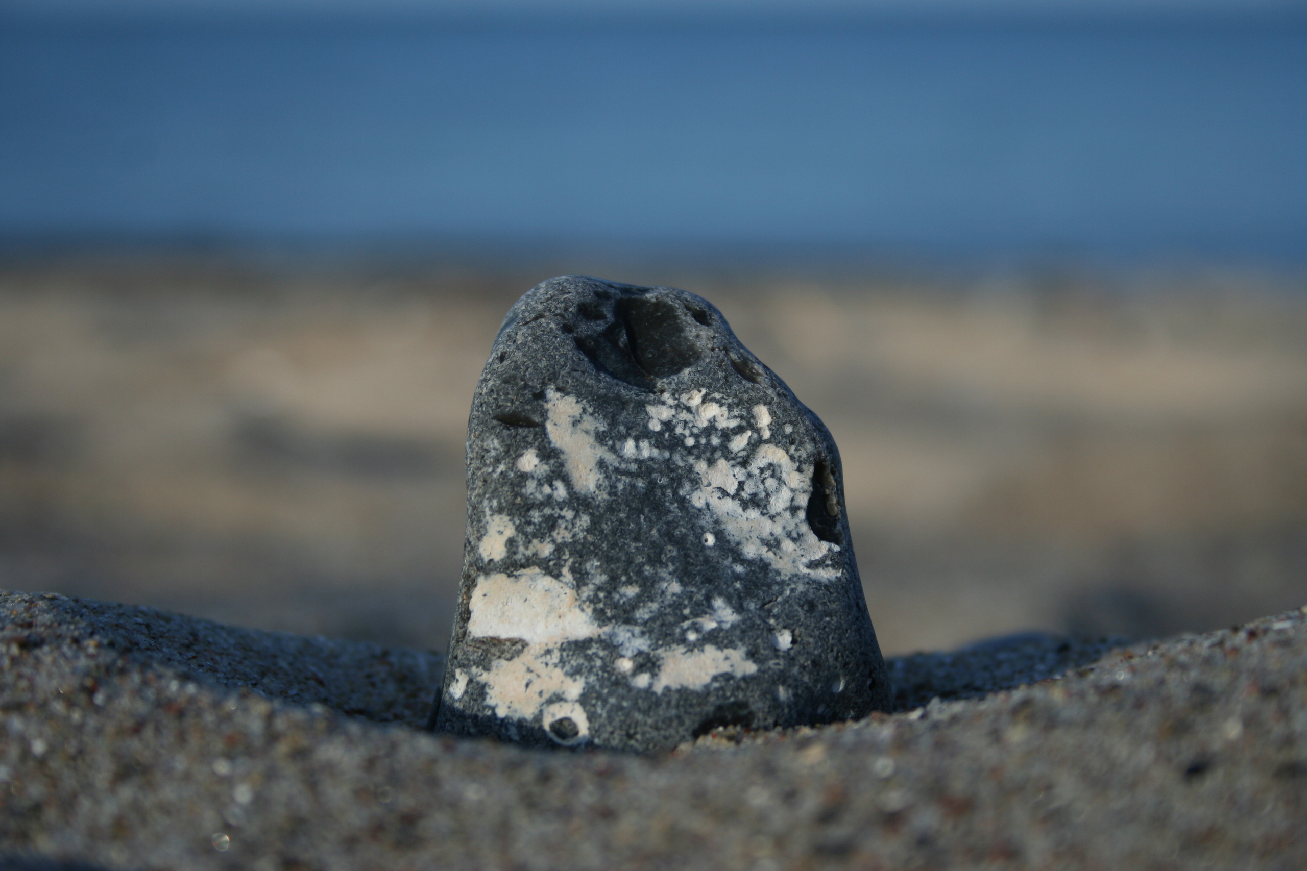 Feuerstein im Kies